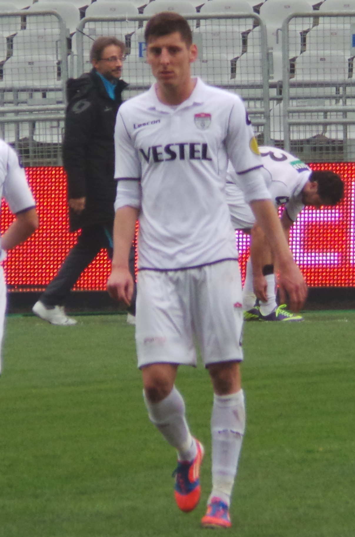 Hikmet Balioğlu